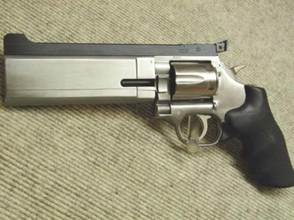 Dan Wesson Revolver Model PPC (38-357 Mag)